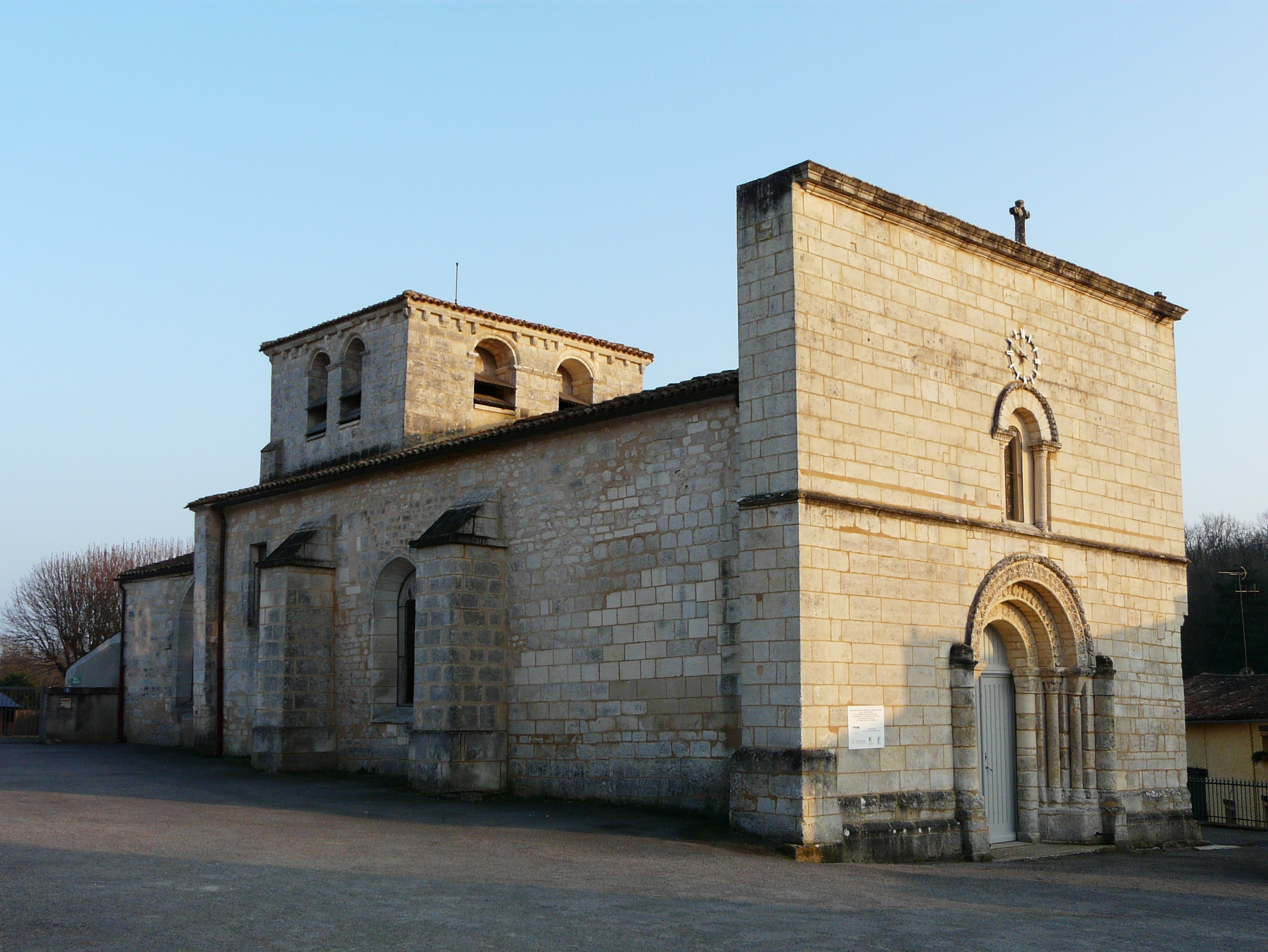 L'église Saint-Laurent de Saint-Laurent-de-Cognac, Charente, France.